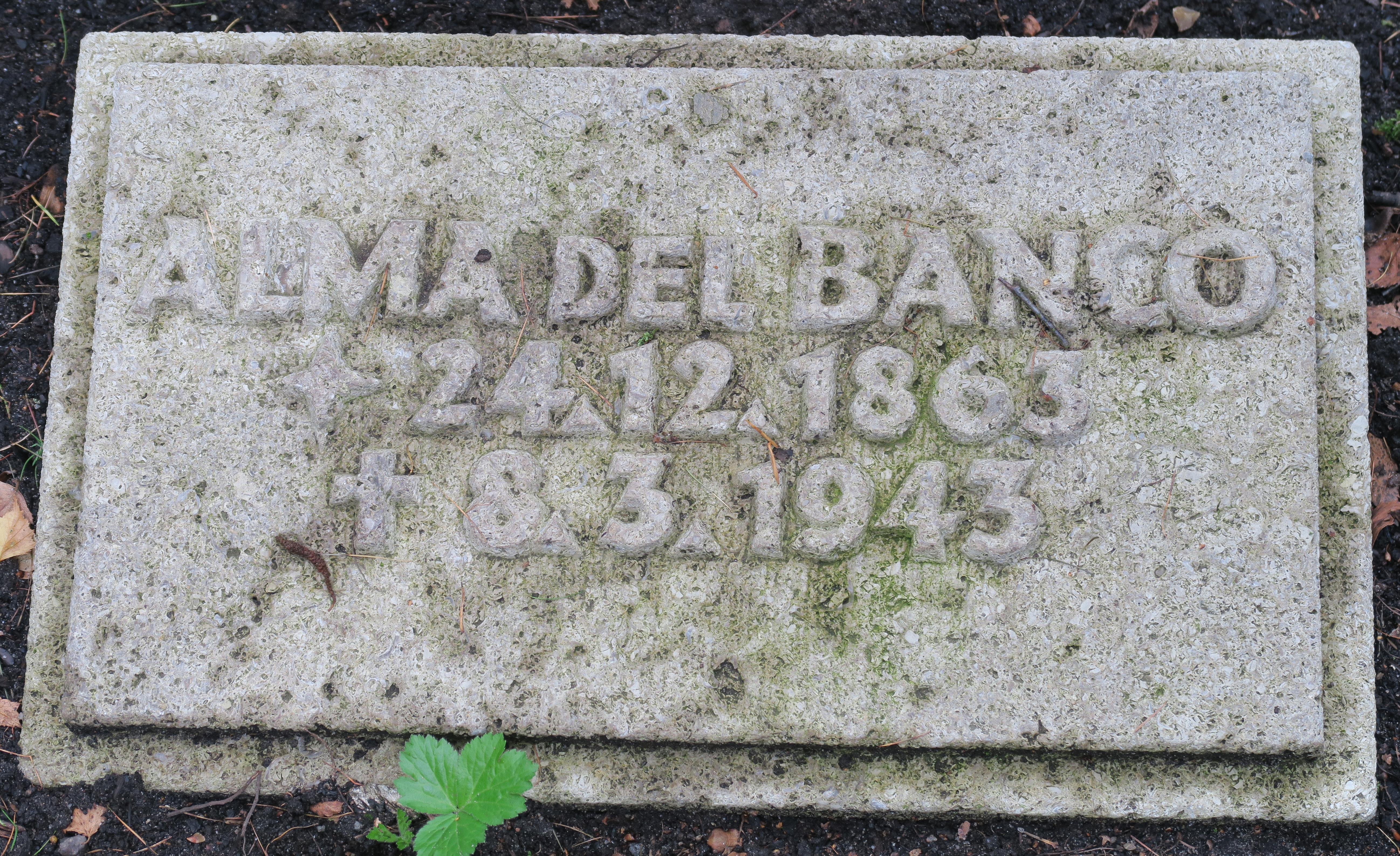 Grabstein Alma del Banco auf dem Ohlsdorfer Friedhof, Hamburg